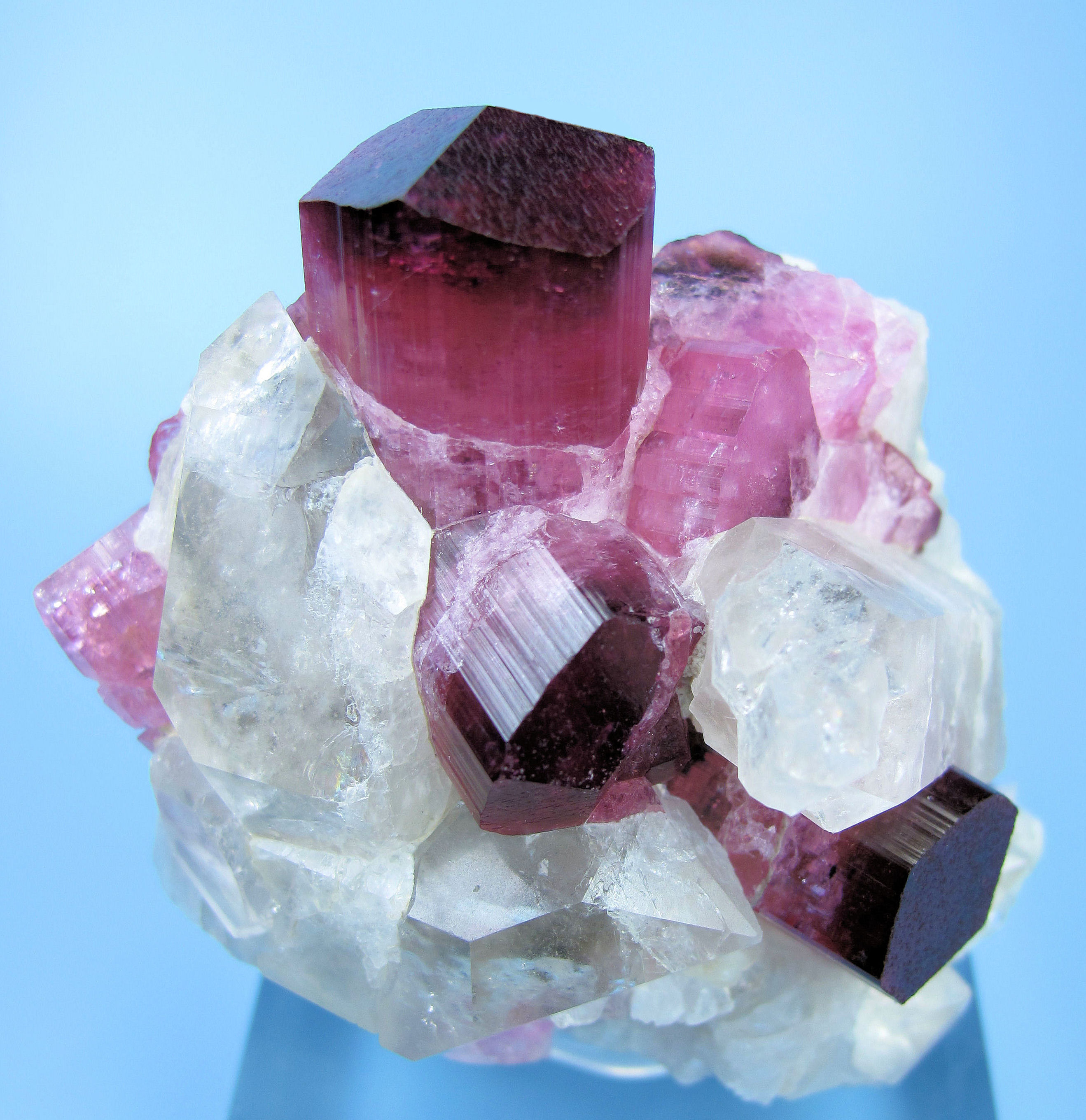 Cristalls d'elbaïta i quars procedents de Male, Mogok, Sagaing, Mandalay, Myanmar (o Birmània)